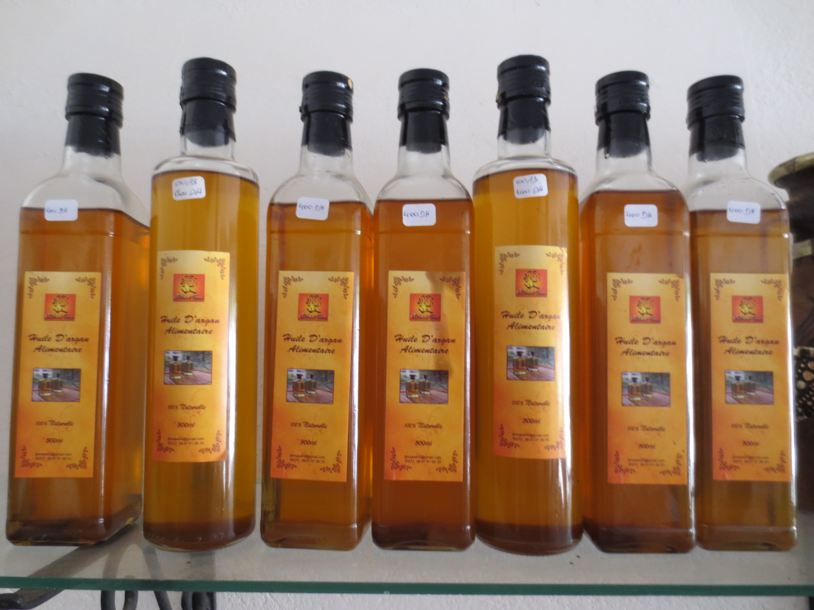 Bouteilles d'huile d'argan entre Marrakech et l'Atlas au Maroc